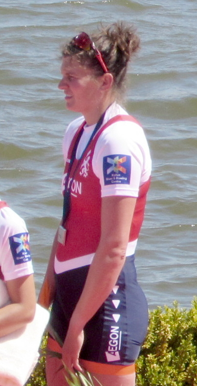 Olivia van Rooijen, Ruder-EM 2016